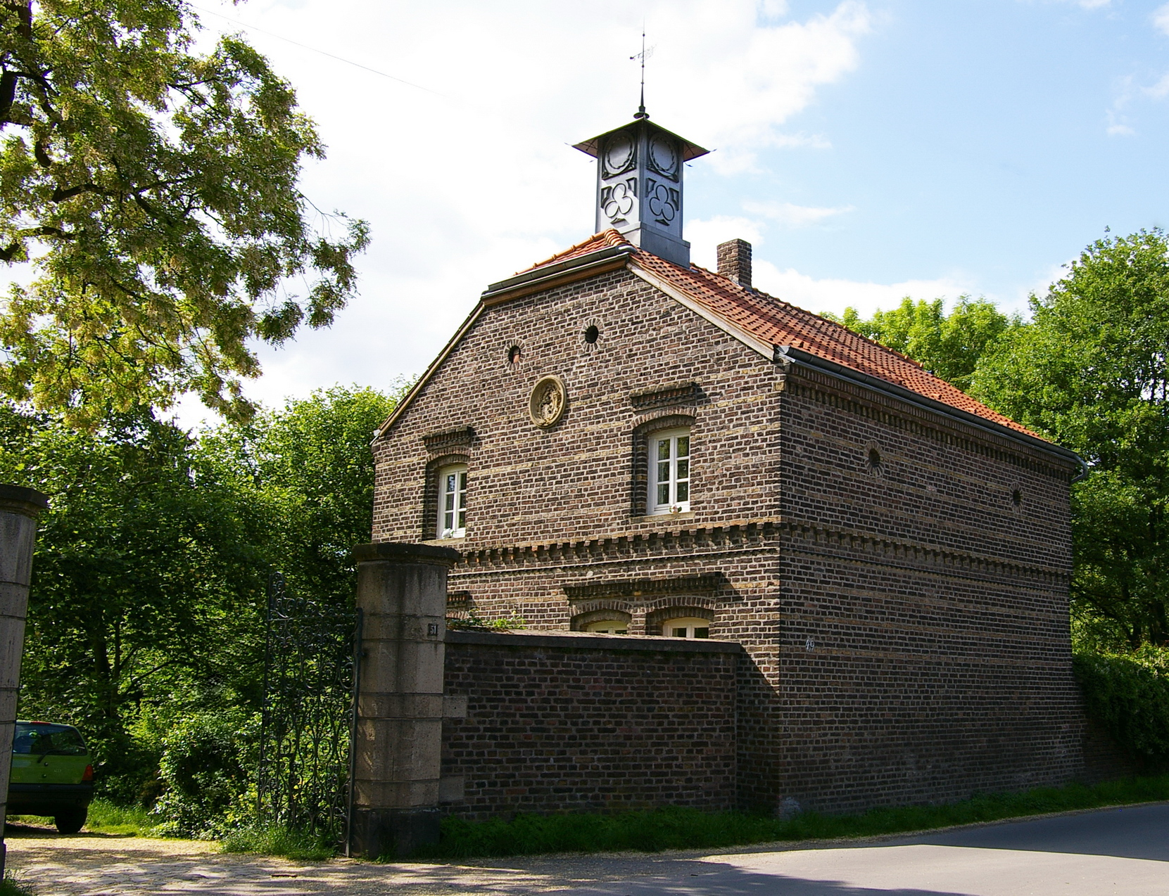 Torhaus am Lanz'schen Park in Düsseldorf Bild nachbearbeitet (Schilder und Oberleitung entfernt), Originaldatei auf Anfrage.